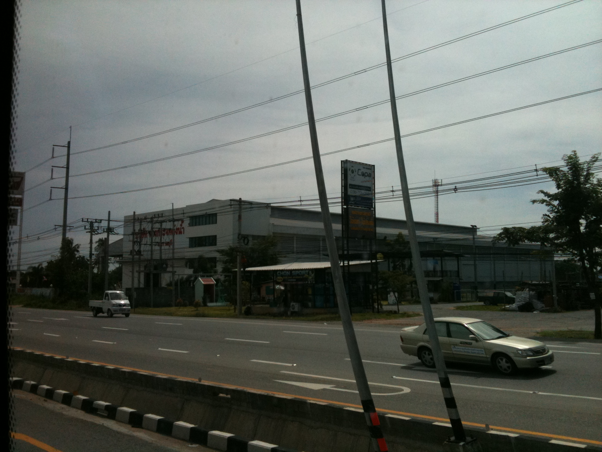 Amazing Thailand